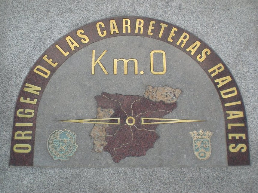 Placa del Km 0. Origen de las carreteras radiales españolas.